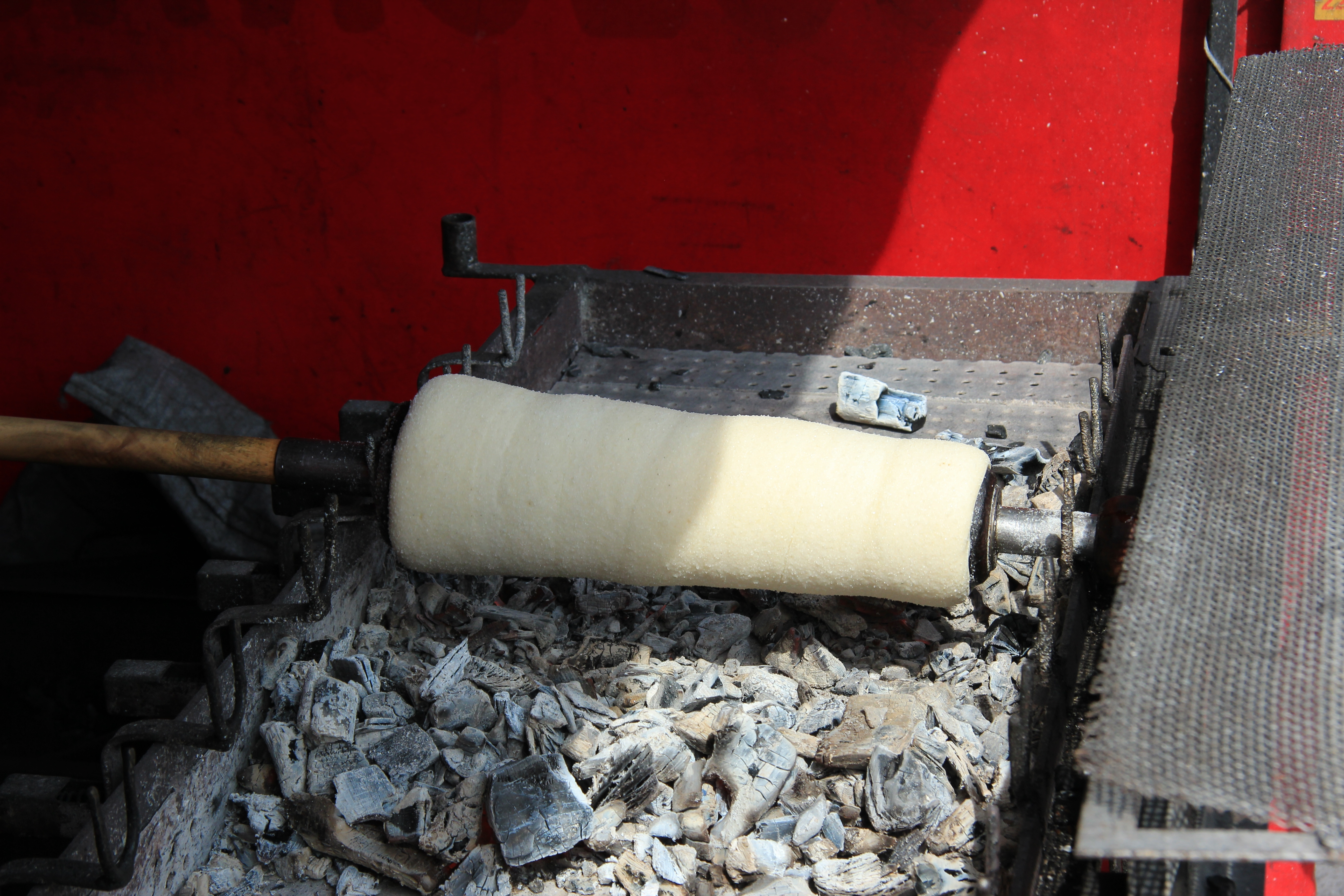 Baumstriezelherstellung am Roten See in Rumänien